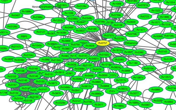 Желтым выделен транскрипционный фактор, функционально взаимосвязанный с многими белками. В левом нижнем углу находится связная компонента из многих белков – это NADH дегидрогеназа со многими своими цепями.